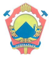 Герб міста Перевальськ